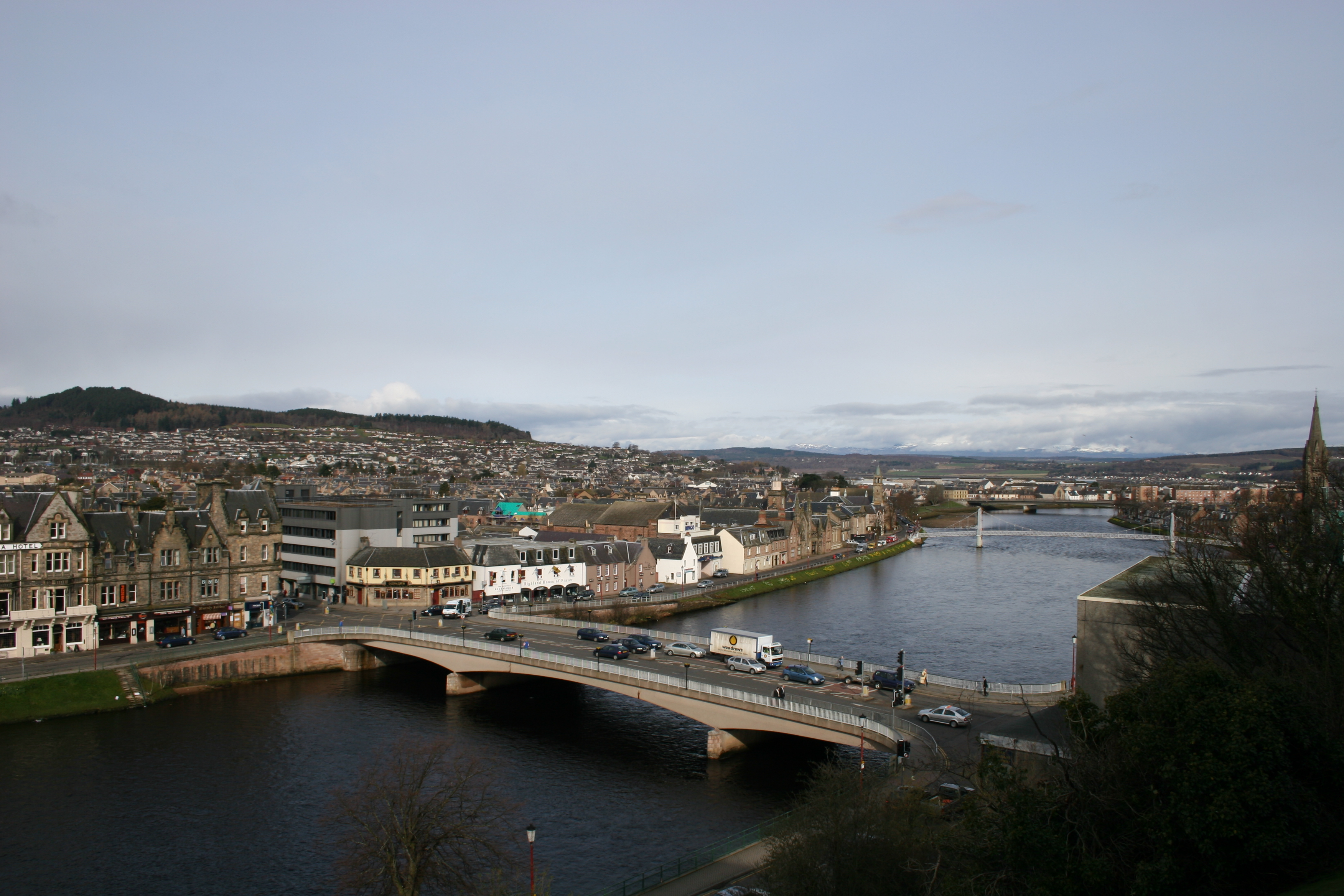 Inverness